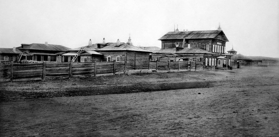 Якутск в XIX веке. Двухэтажное деревянное здание - Якутская духовная семинария